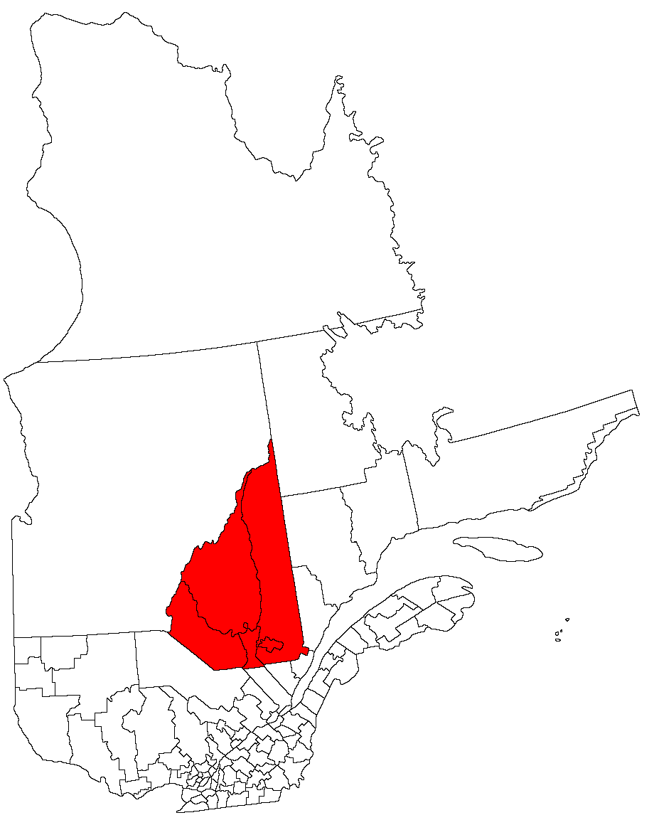 Saguenay-Lac-Saint-Jean region, Quebec